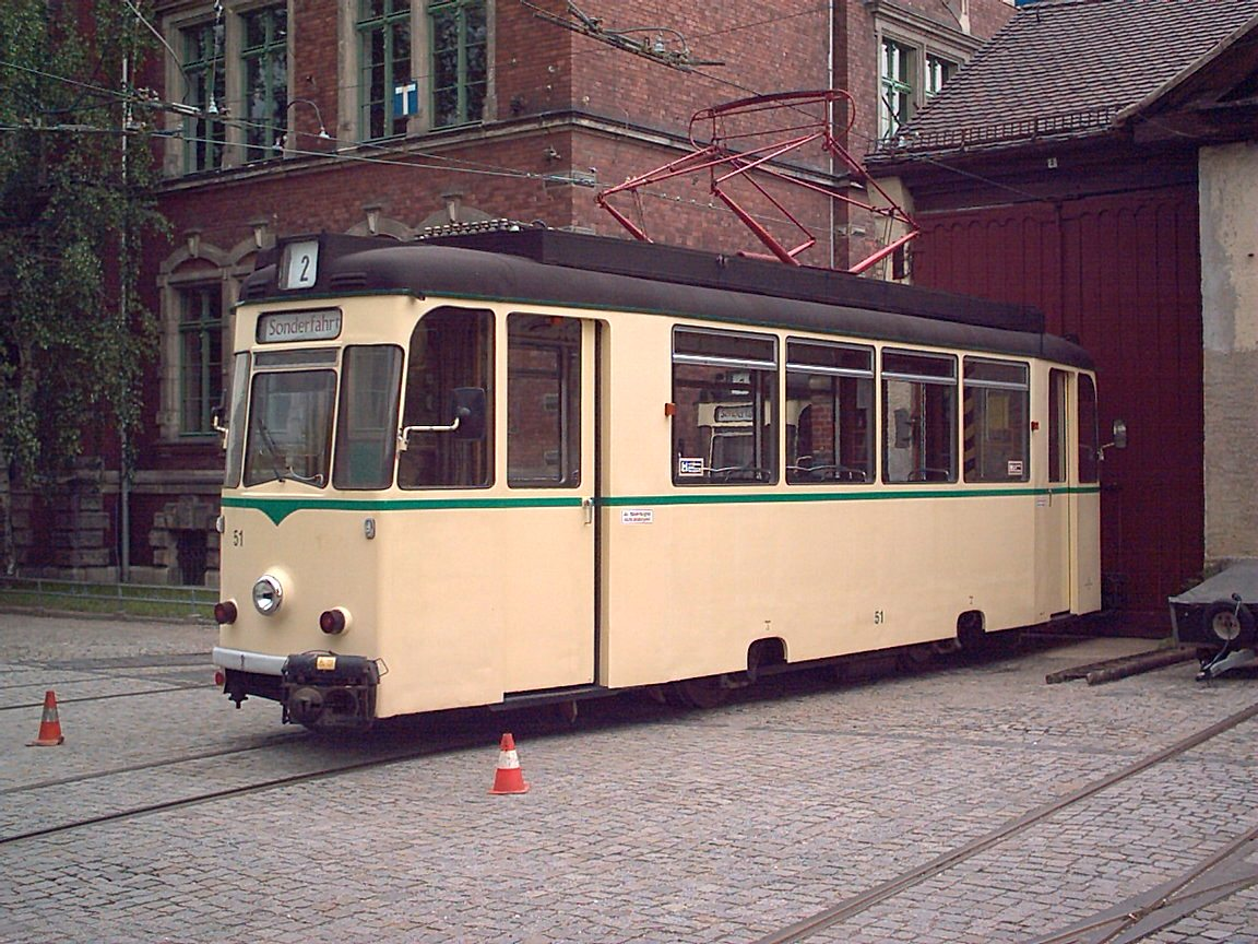 Triebwagen 51 der Naumburger Straßenbahn vom Typo Reko-Wagen TZ 70/1